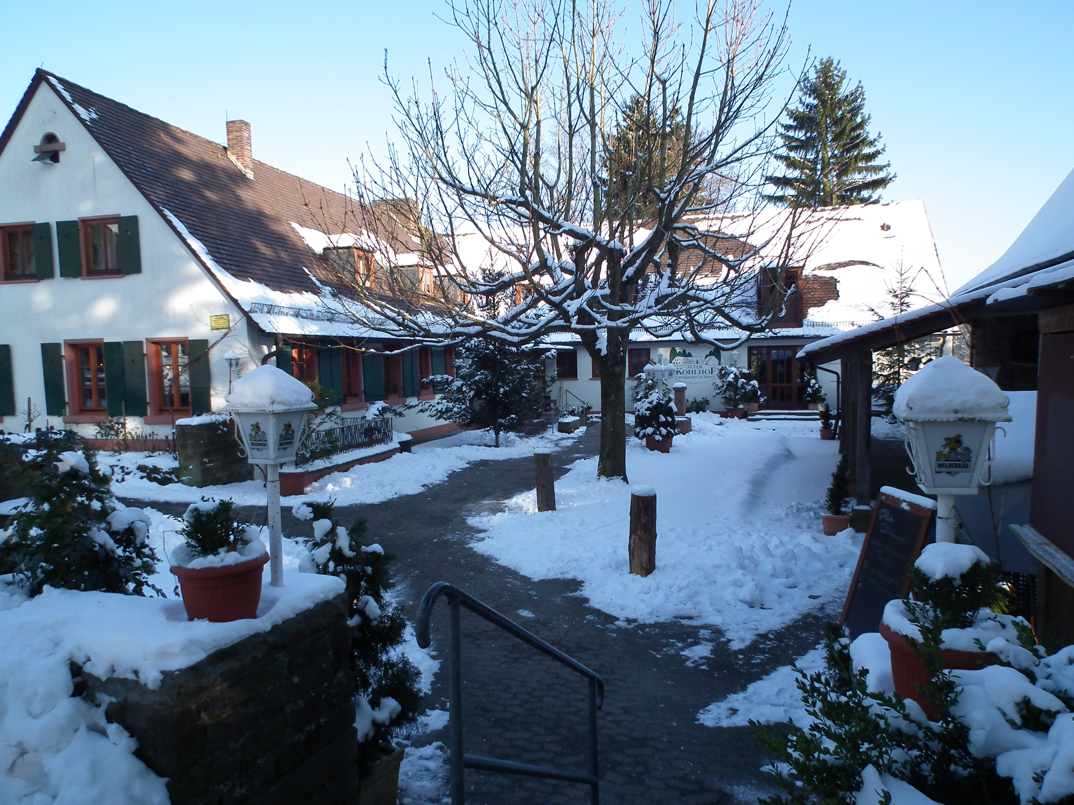 Landgasthof und Hotel "Alter Kohlhof" im Heidelberger Stadtteil Kohlhof (Baden-Württemberg, Deutschland)